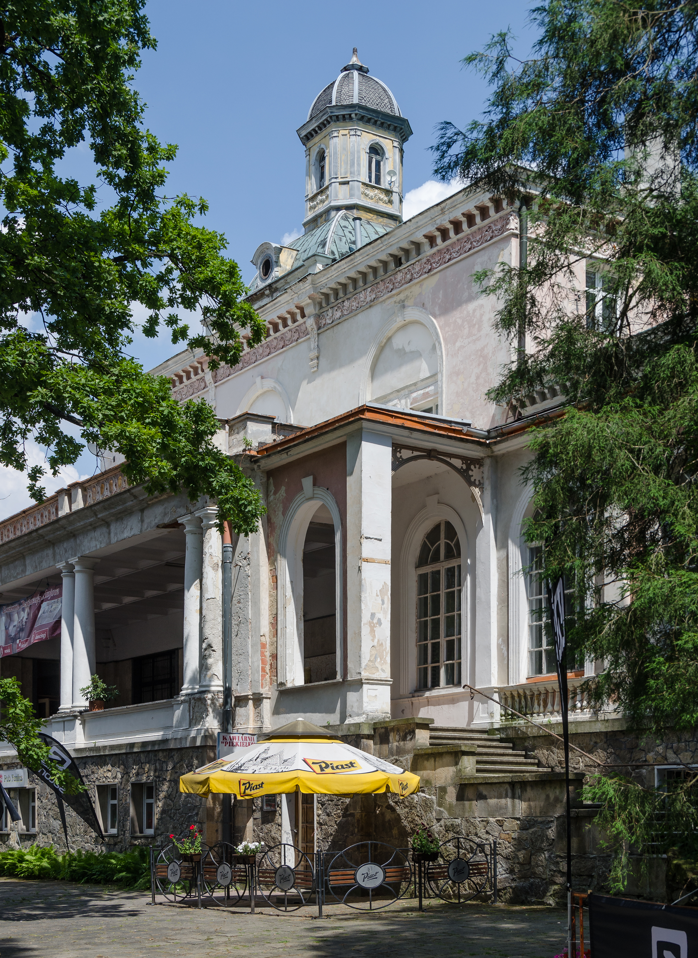 Kurhaus (Kurterrasse) im Kurbezirk, Bad Landeck (Lądek-Zdrój), Niederschlesien, Polen.